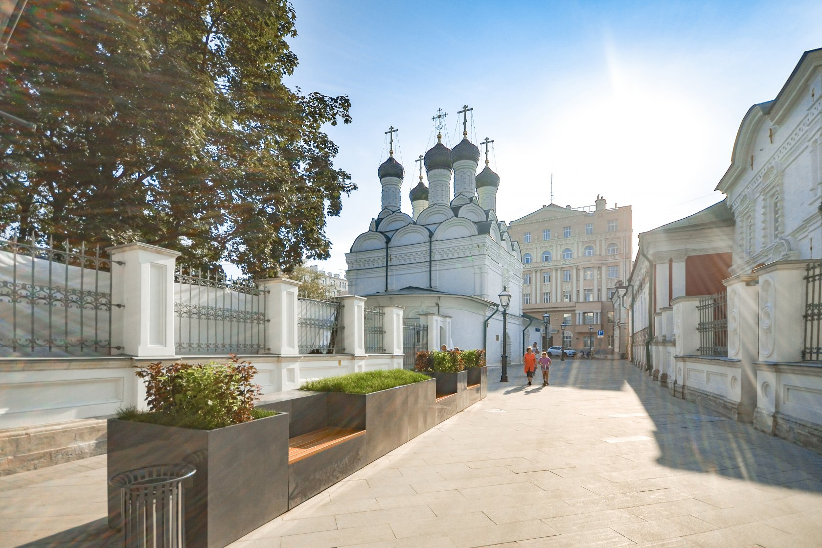 Черниговский переулок после реконструкции в 2016 году